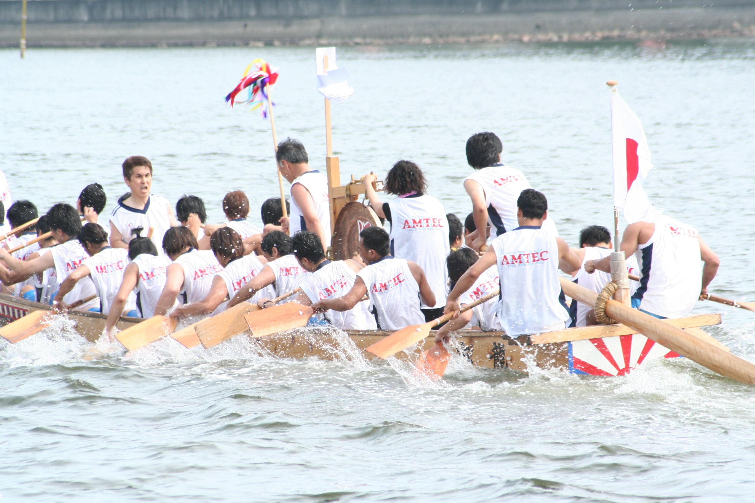 相生ペーロン祭。兵庫県相生市にて毎年開催される祭。2009年7月11･12日の2日間にかけて行なわれた祭の2日目の様子。